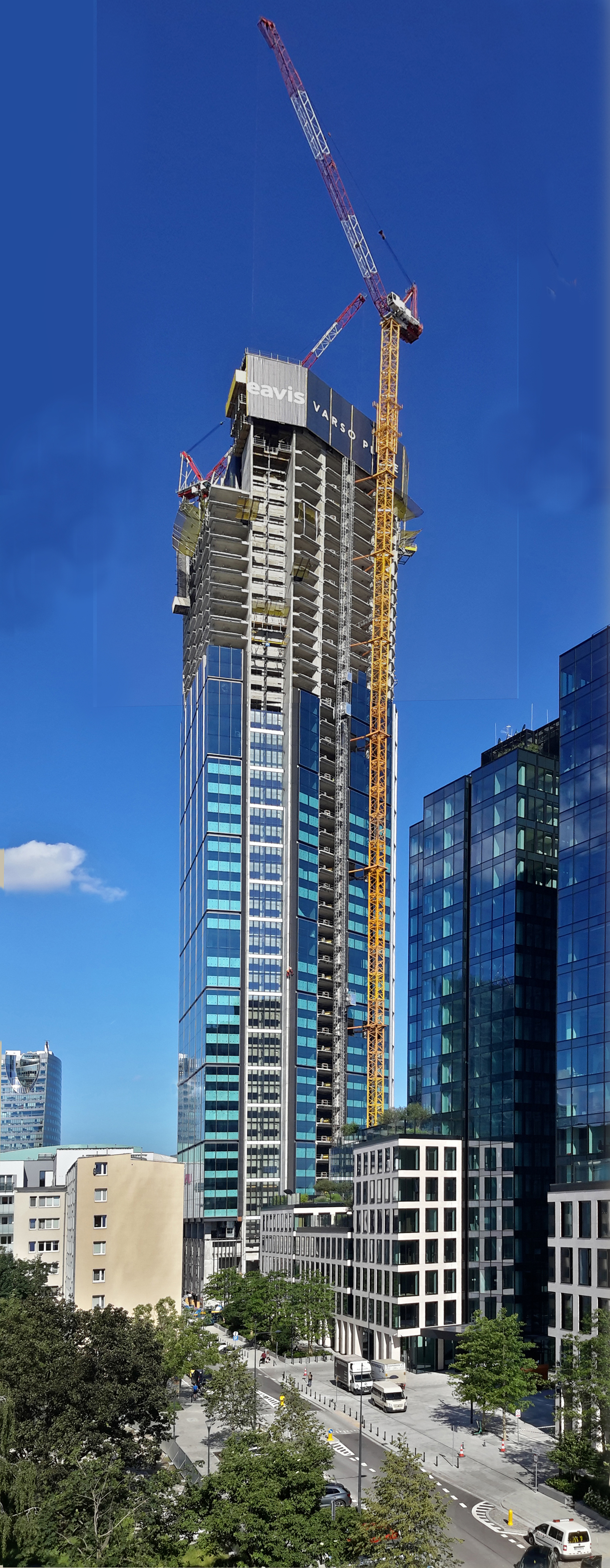 Plac budowy Varso w dniu 1 lipca 2020